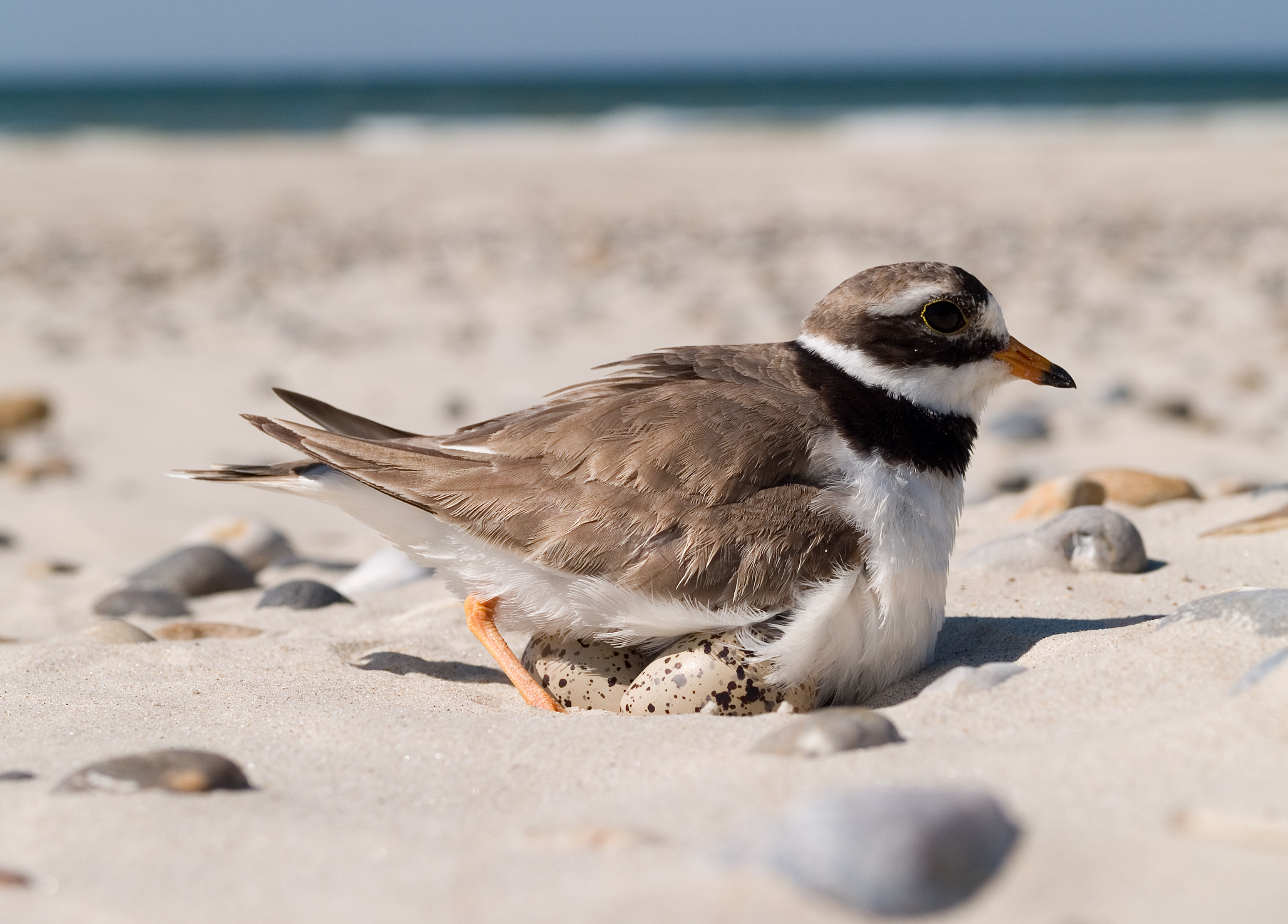 Charadrius hiaticula - Sandregenpfeifer, brütend, in Nordjütland (DK) am Nordseestrand